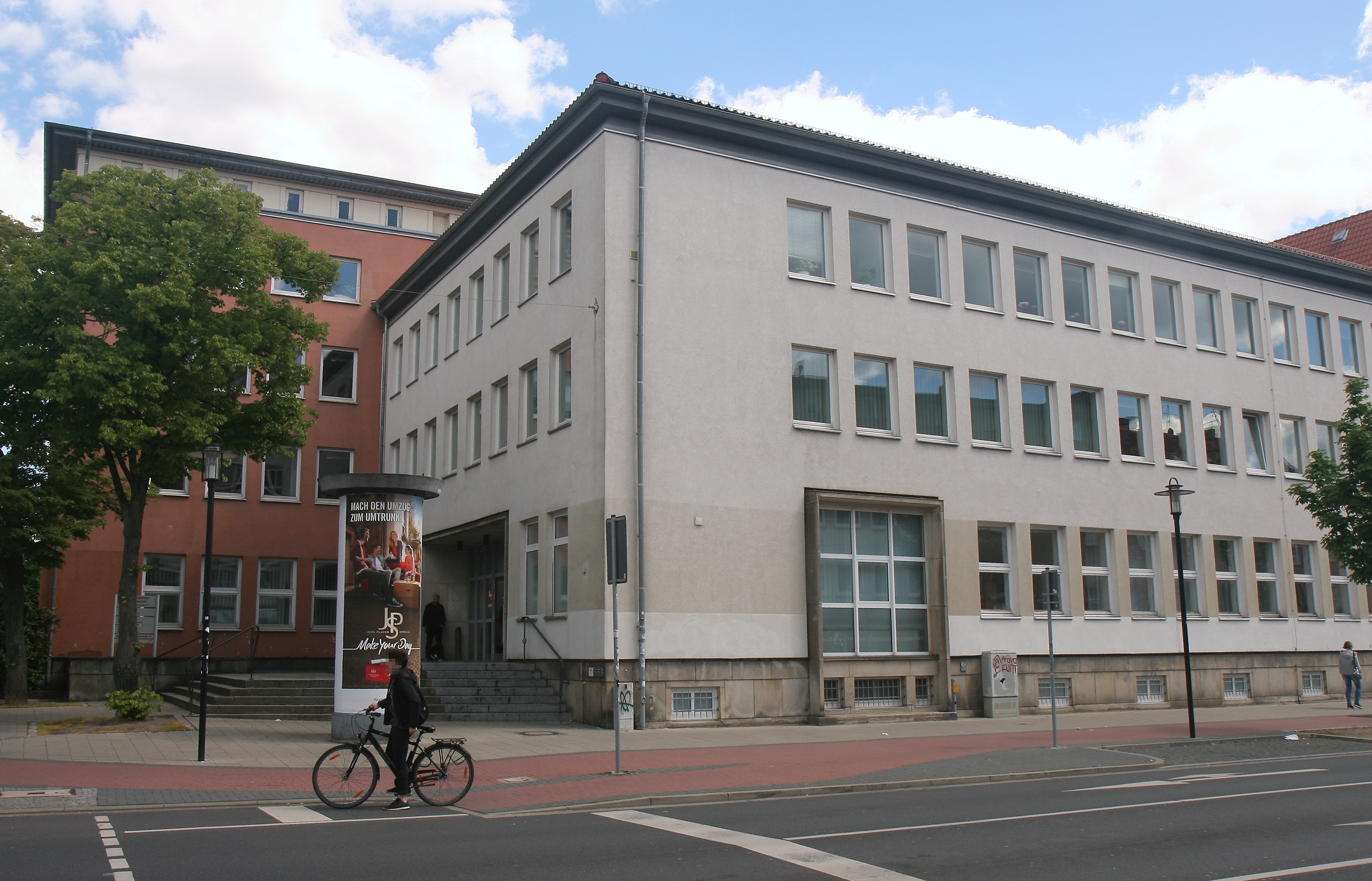 Justizbehörden Hildesheim (Gebäude C), Nebenstellen Bahnhofsallee 37/Kaiserstraße in Hildesheim. Amtsgericht: Zivilprozessabteilung; Landgericht: Wirtschaftsstrafkammern; Staatsanwaltschaft: Wirtschaftsabteilung und Amtsanwaltsabteilung